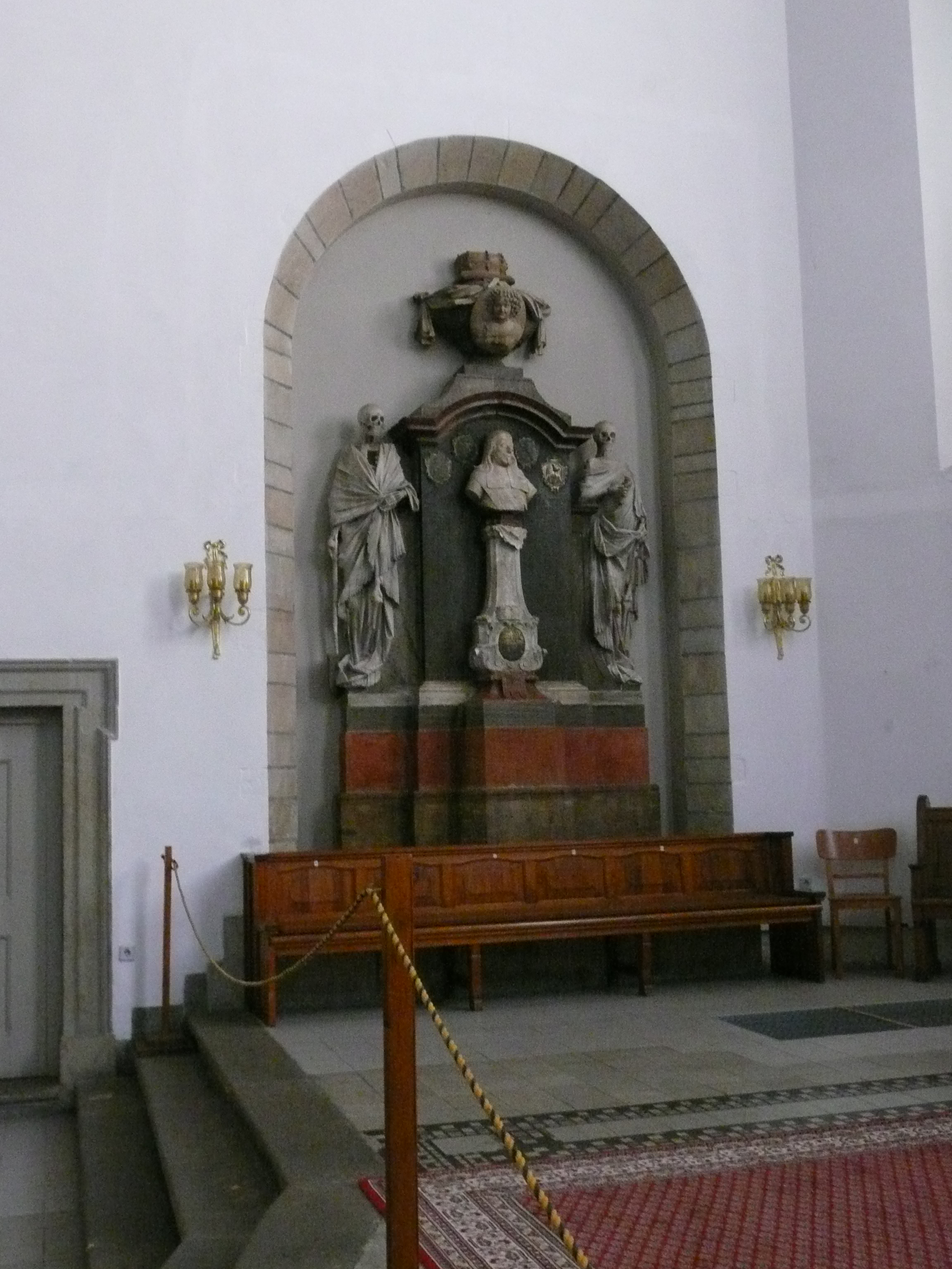 Grabmal für Herzog Ernst I. Entstehungsjar: 1728, geschaffen von Jeremias Tüttleb Quelle: Dehio. Handbuch der Kunstdenkmäler Deutschlands. Thüringen. Bearbeitet von Stephanie Eißling, Frank Jäger u. a., Berlin und München 1998